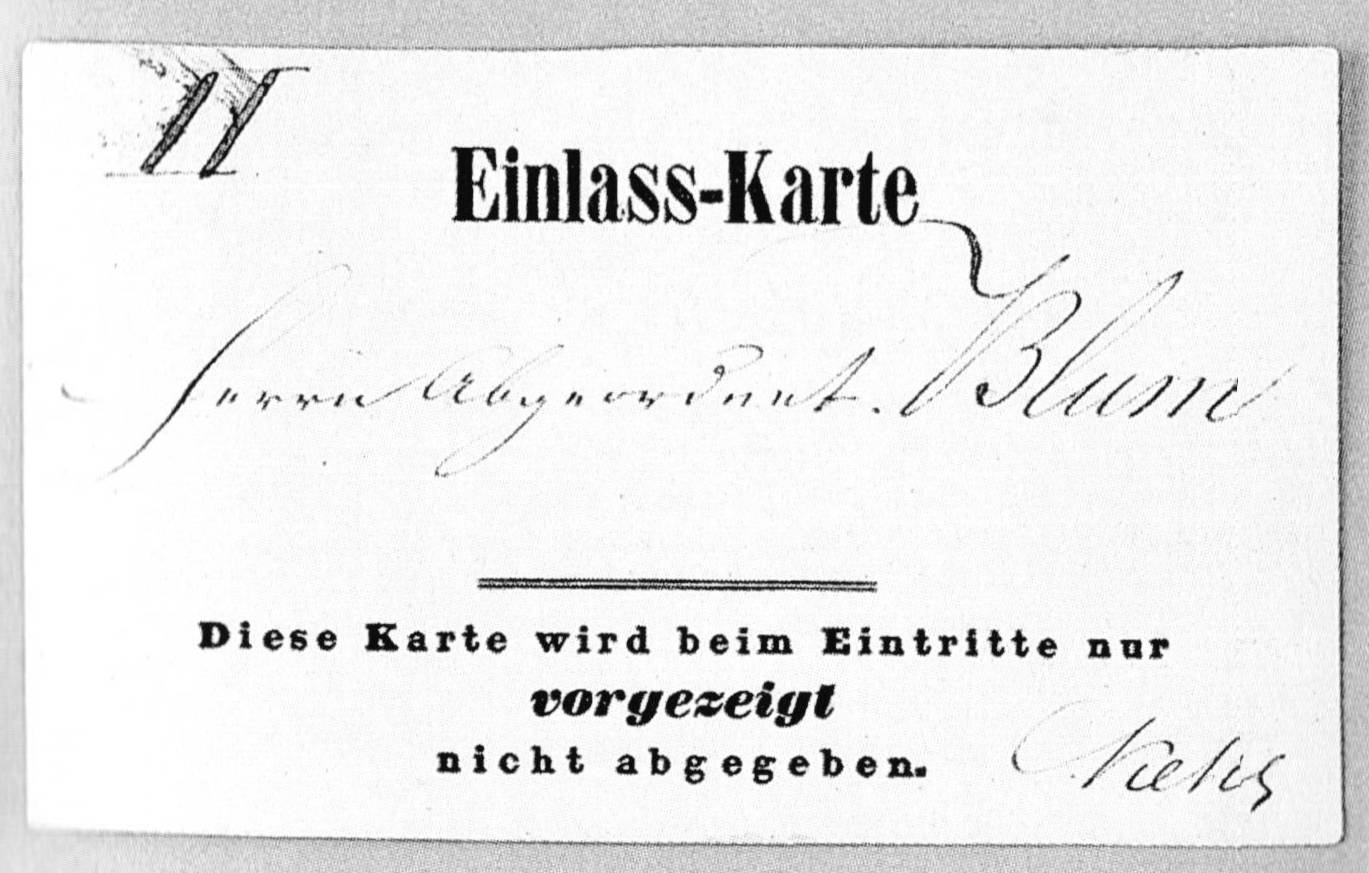 Einlaß-Karte für den Abgeordneten Robert Blum, 1848. Frankfurter Nationalversammlung.